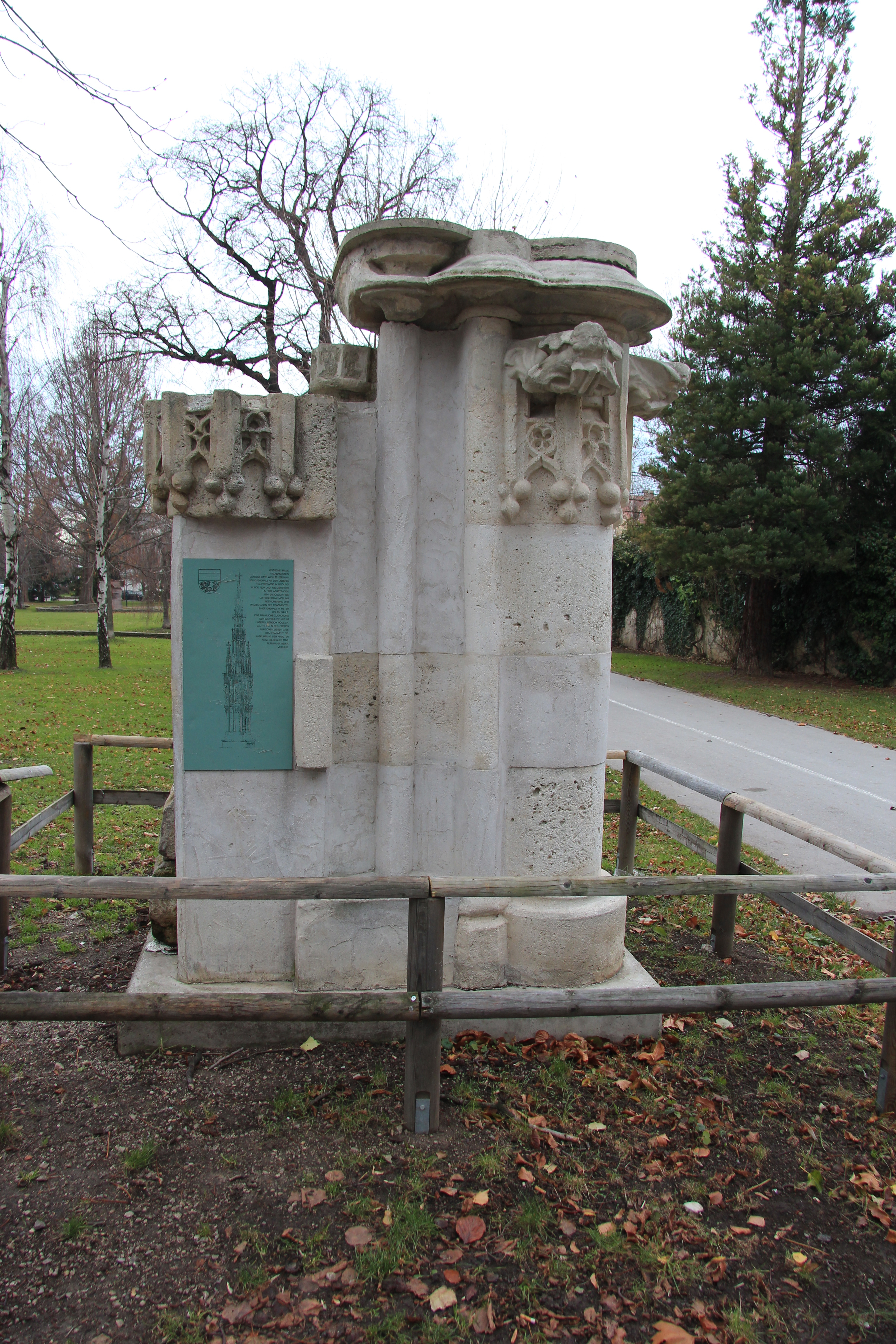 Fragment einer Kalksteinsäule der Wiener Dombauhütte im Museumspark Mödling